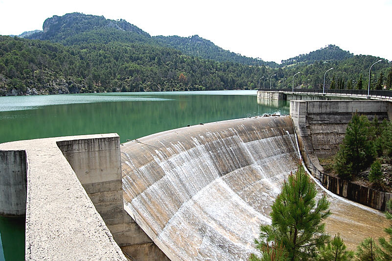 Embalse Aguascebas